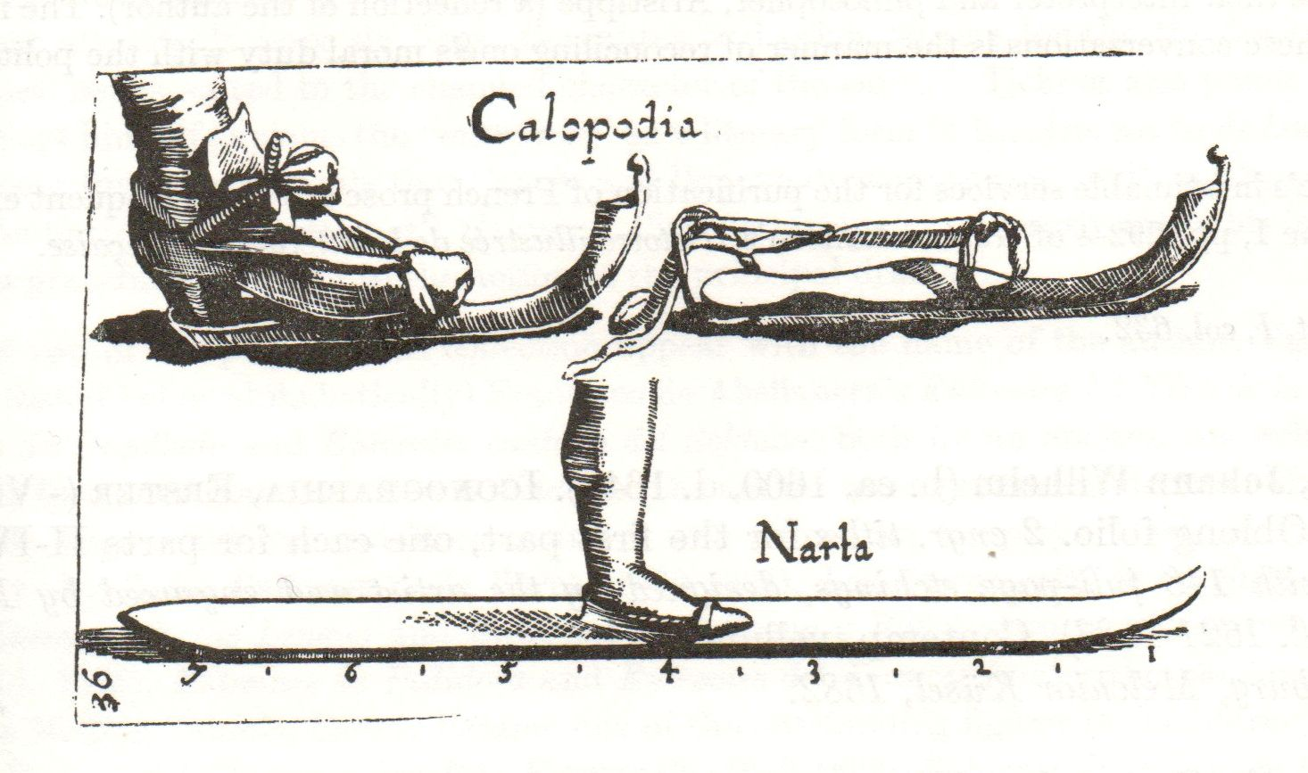 Ski/Schneeschuh o. ä., Illustration aus Johann Friedrich Nilants Schuhenzyklopädie, Aufl. von 1711